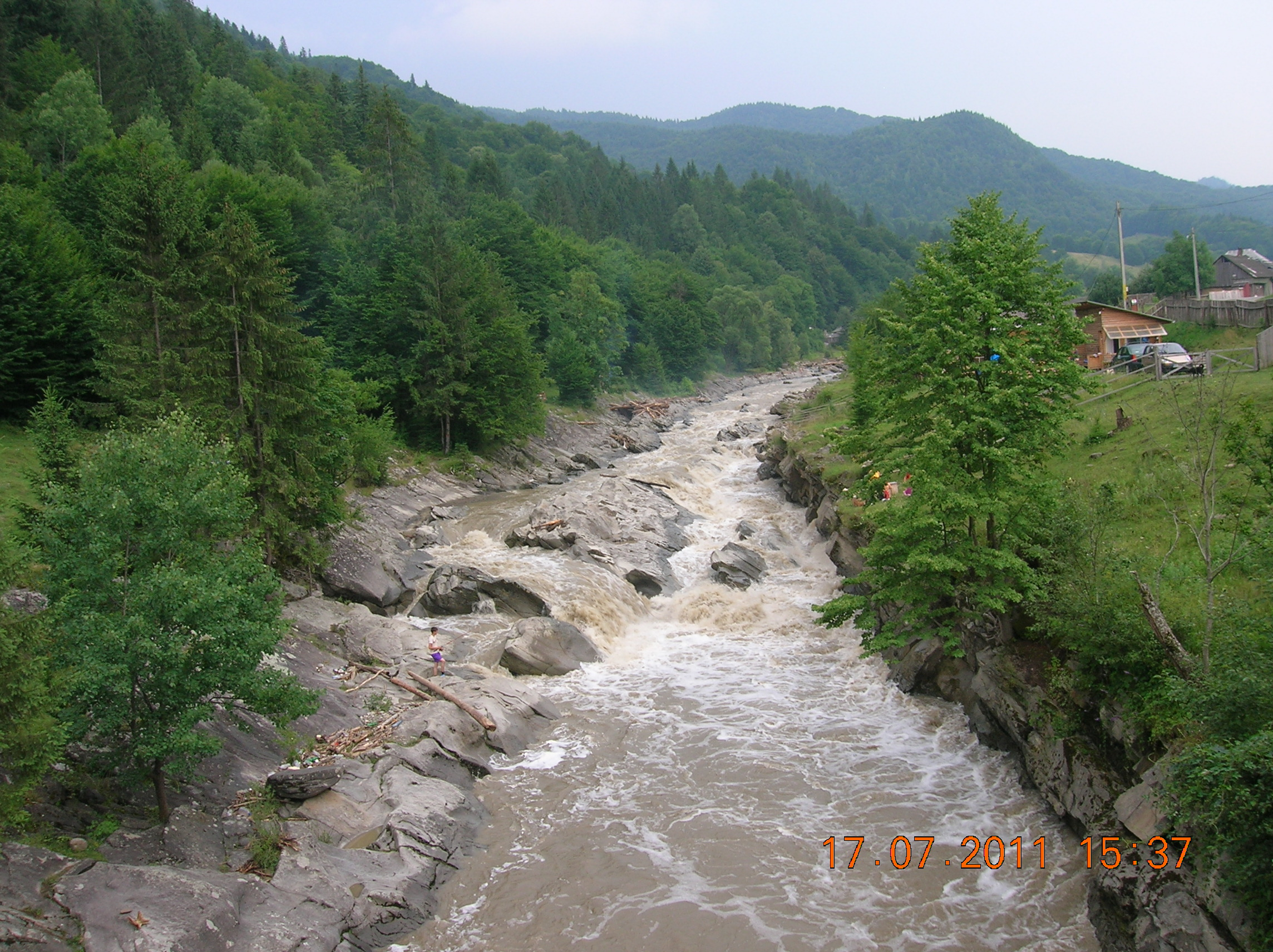 Munţii Tarcăului (Carpaţii Orientali, România)-Repezişurile Ianuş